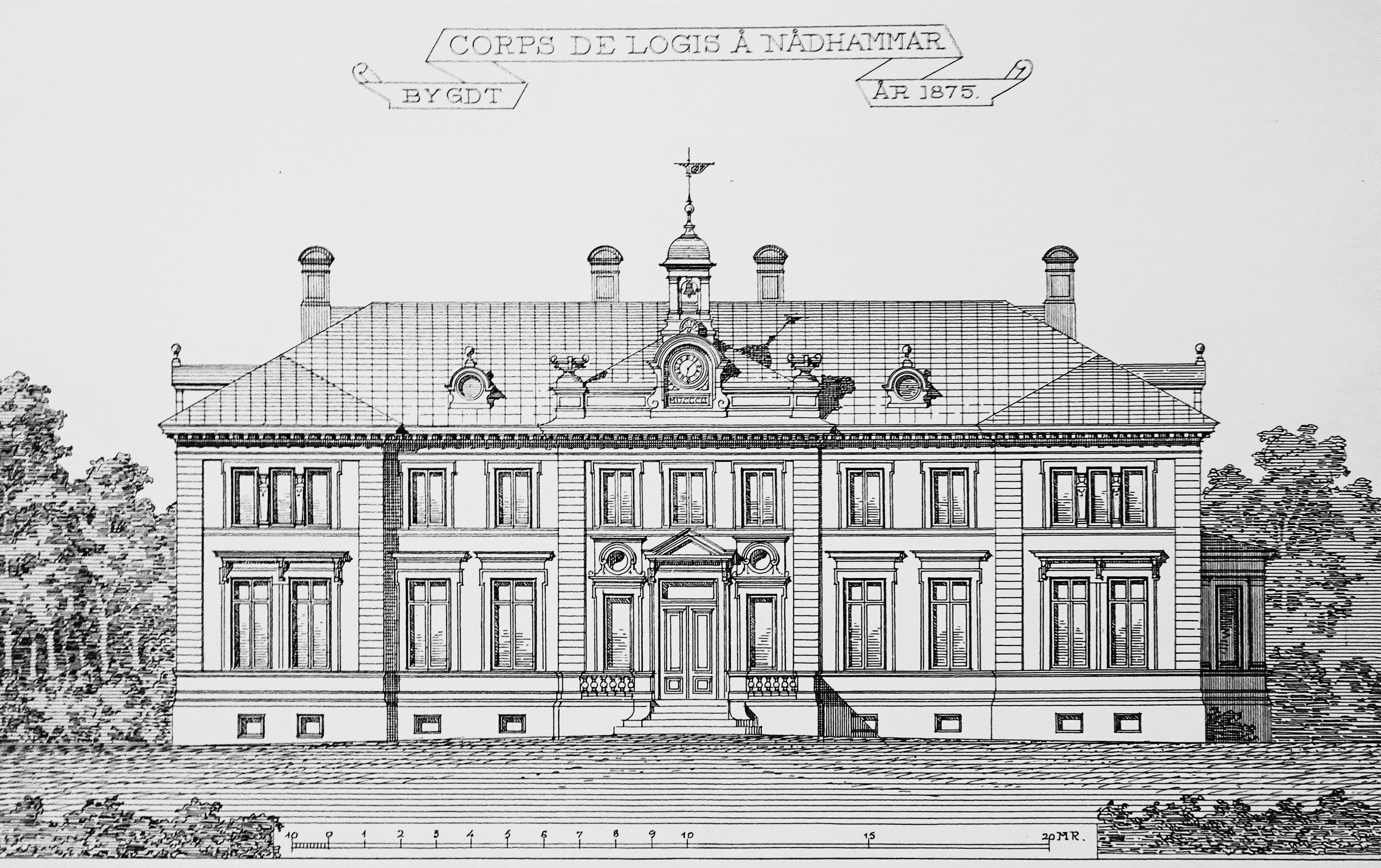 Nådhammars huvudbyggnad ritad av arkitekten Hjalmar Kumlien